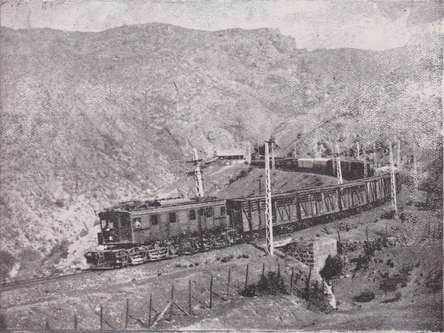 En la actualidad, basta una locomotora eléctrica. Circa 1929. Imagen obtenida a partir del libro (in Spanish) (1929) Ferrocarriles del Estado de Chile (3rd ed.), Santiago: Impr. Harris y Pascual